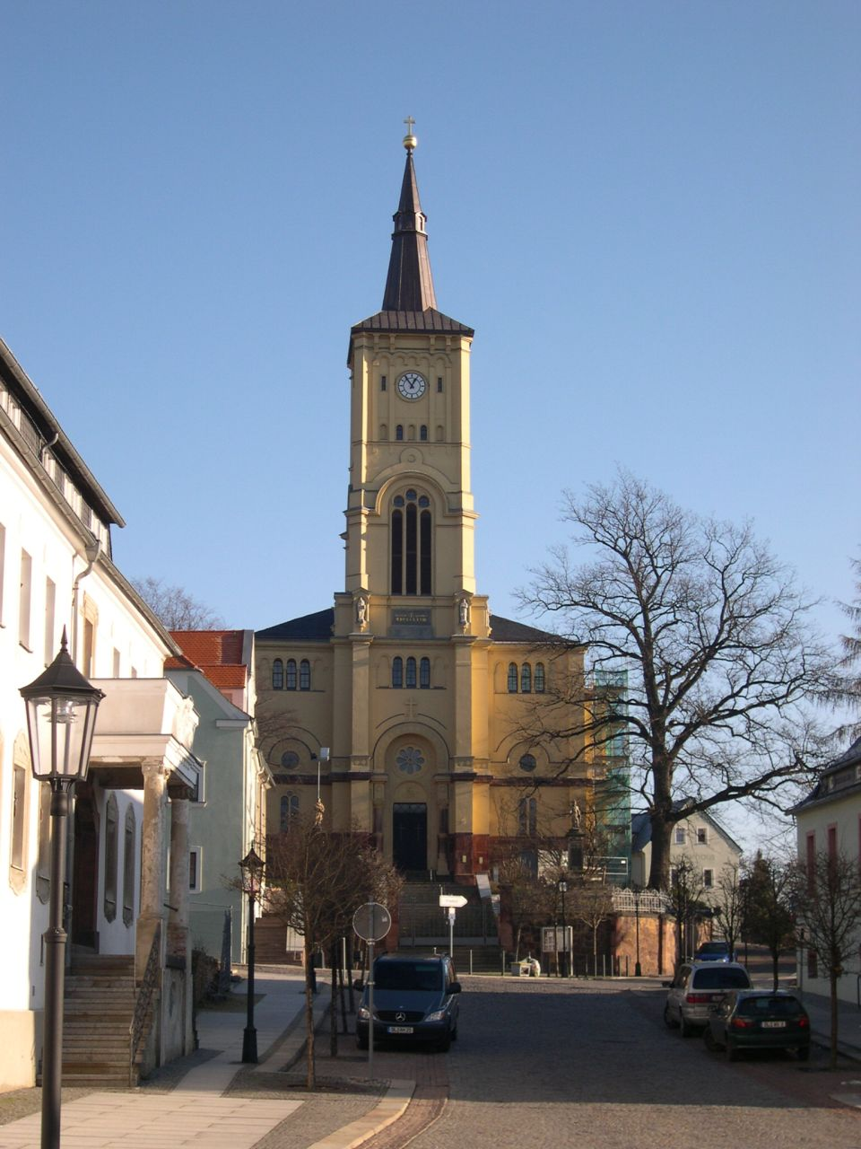 Harthas Kirche am Marktplatz